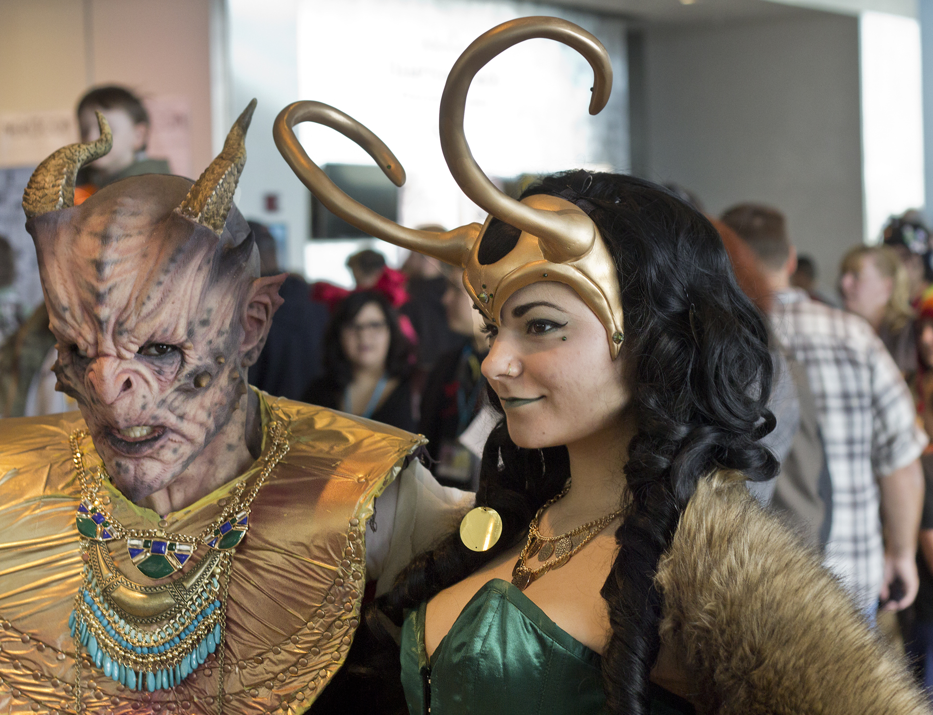 Nekocon 17 Hampton Virginia Va.